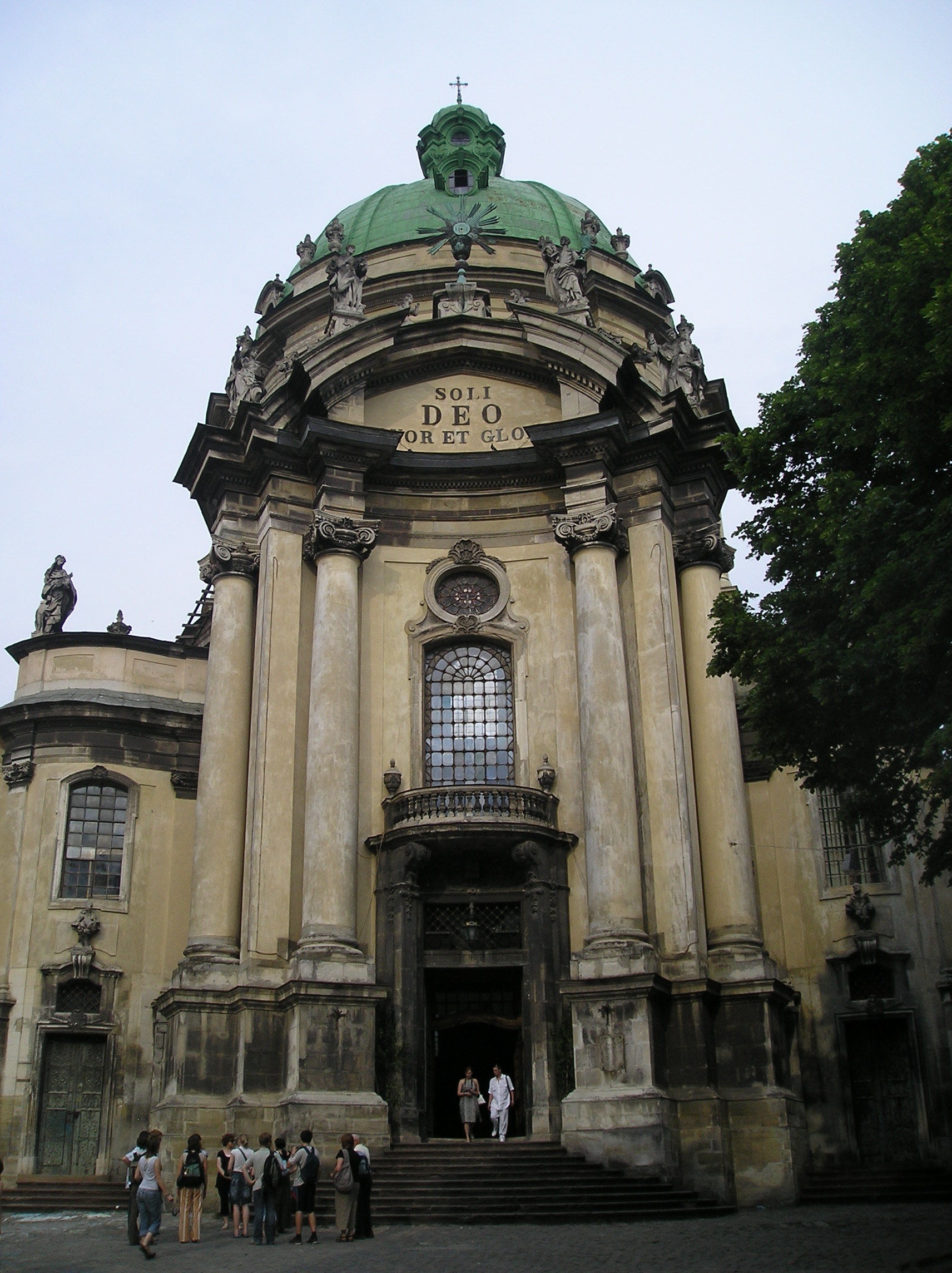 Kościół Dominkanów we Lwowie